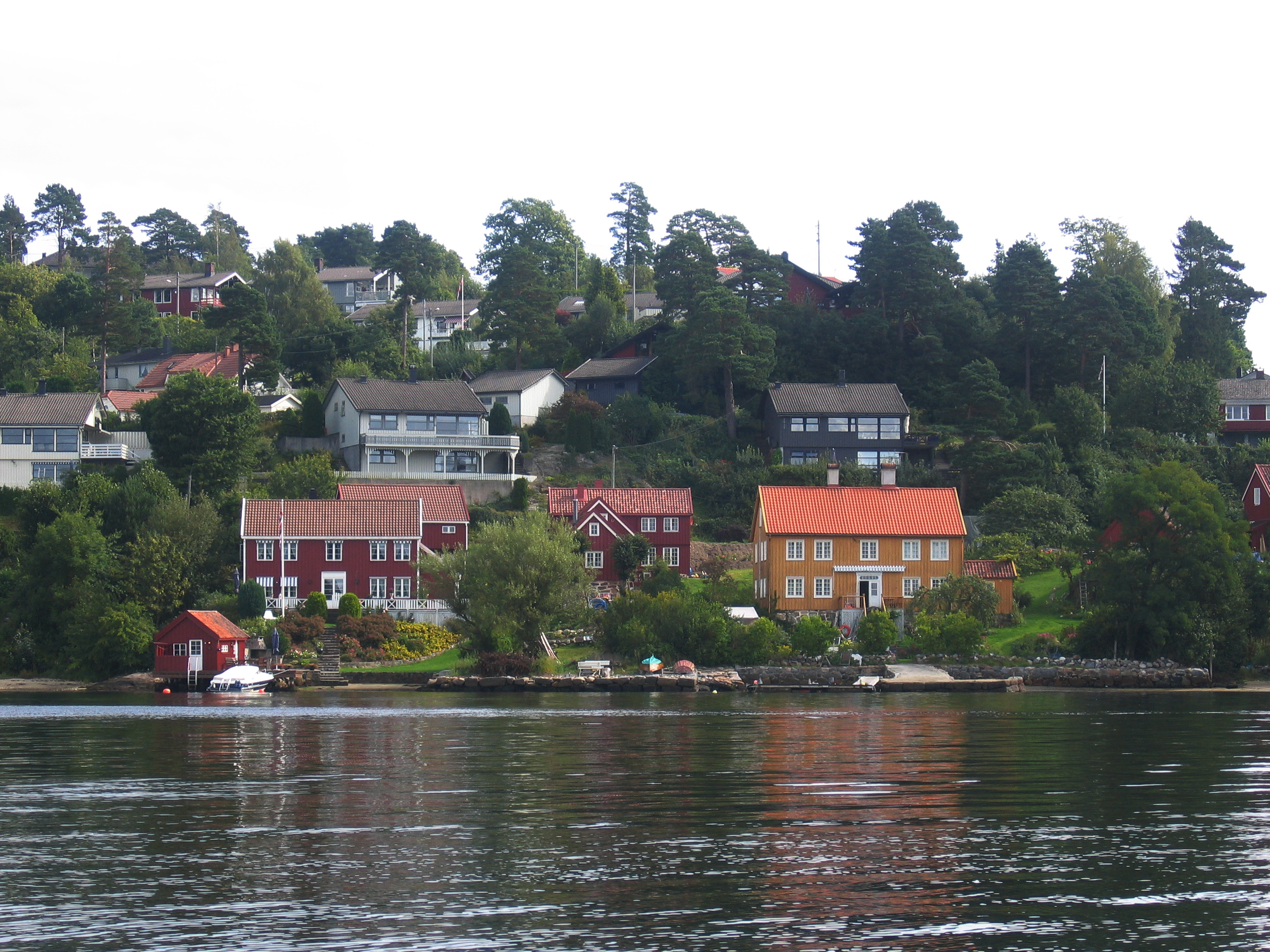 Sandstø in urban area Kongshavn in Arendal.